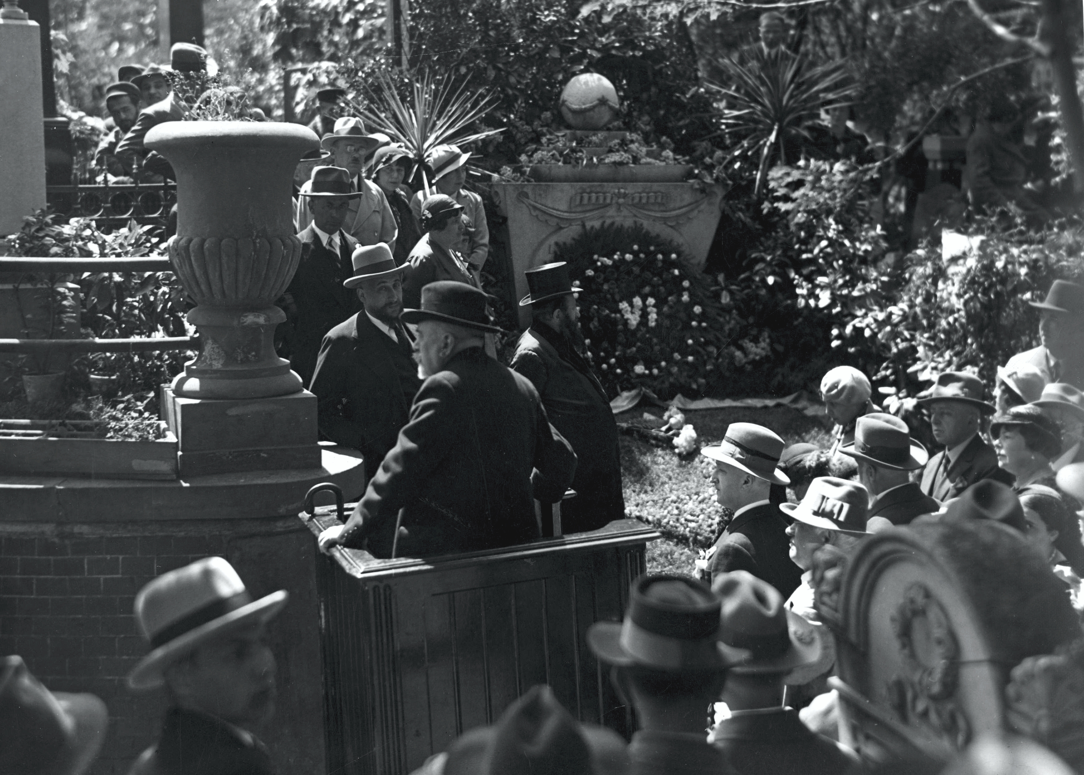 VI Ogólnopolski Zjazd Esperantystów w Warszawie. Uczestnicy zjazdu składają wieniec na grobie Ludwika Zamenhofa. Przemawia Leo Belmont. Widoczni: Adam Zamenhof, Edward Wiesenfeld